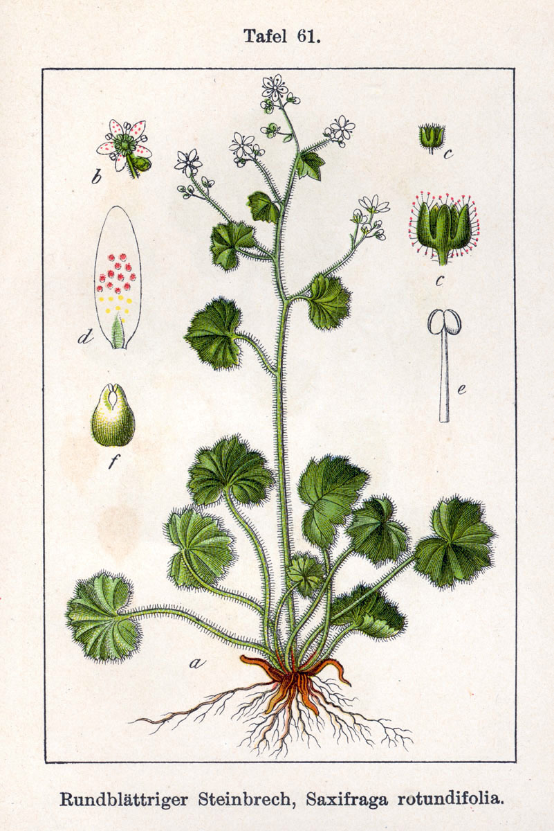 Saxifraga rotundifolia L. Original Description Rundblättriger Steinbrech, Saxifraga rotundifolia